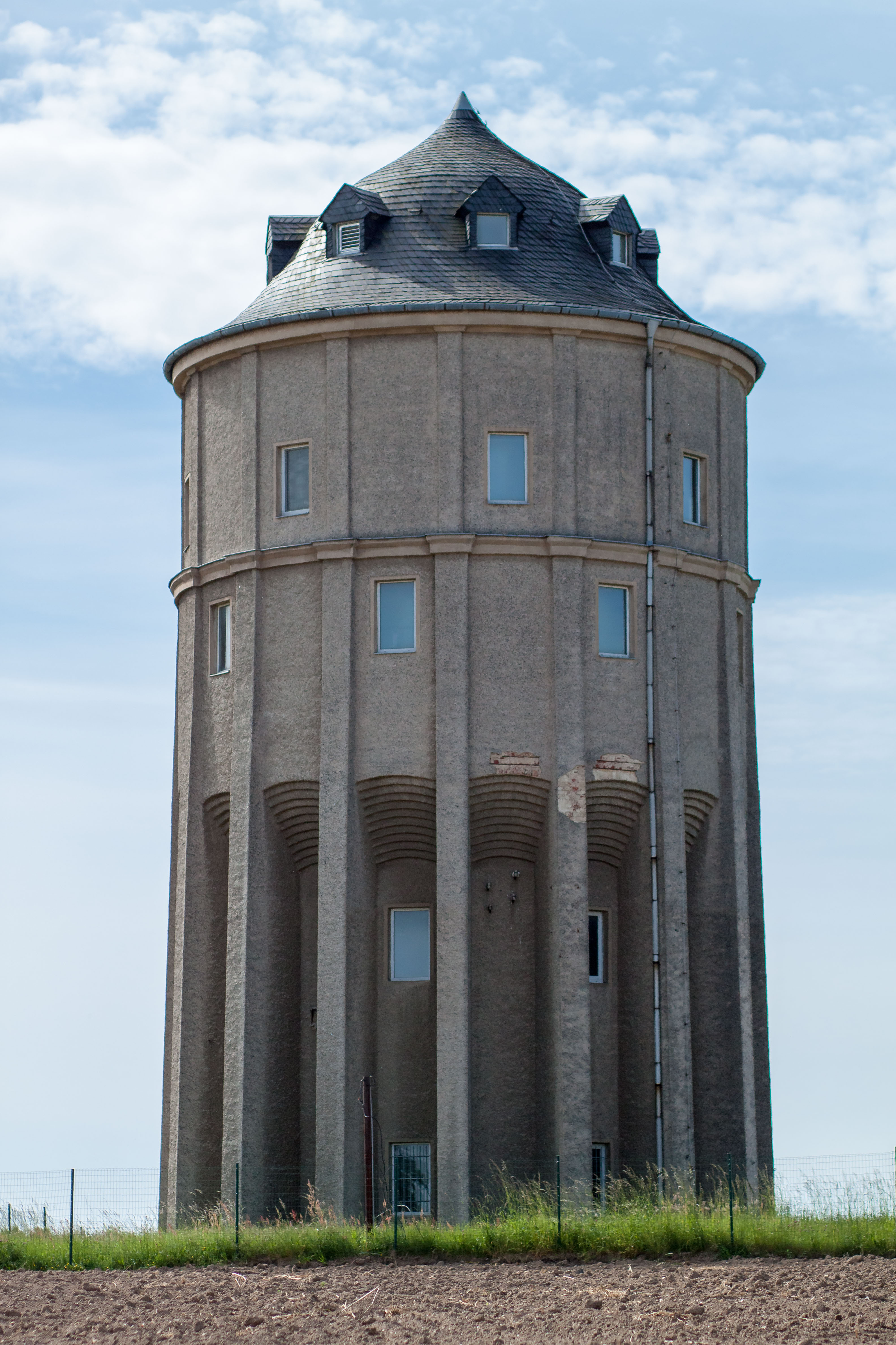 Wasserturm, Breiter Rain in Leisnig